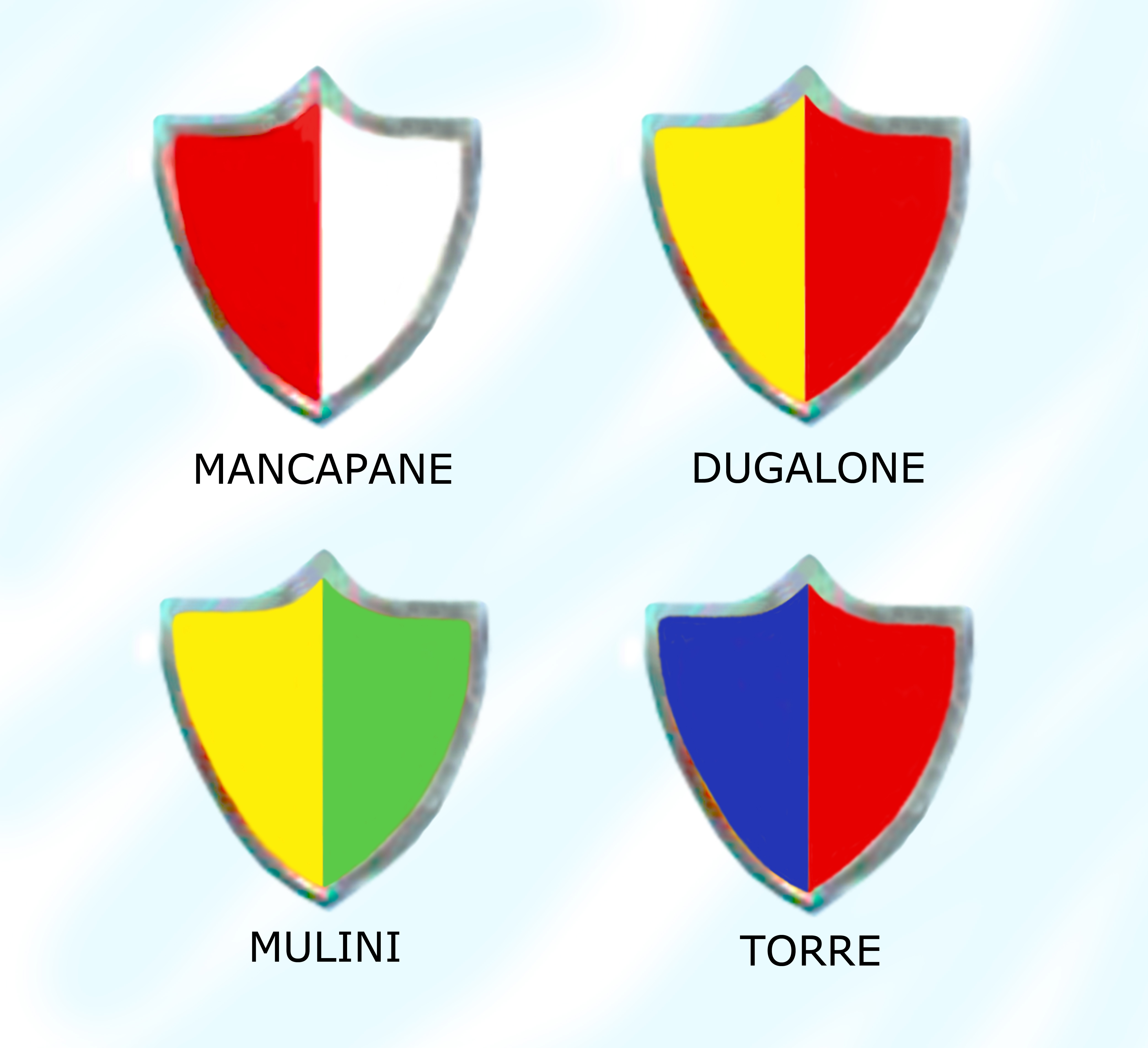 Stemmi delle Contrade a Travagliato